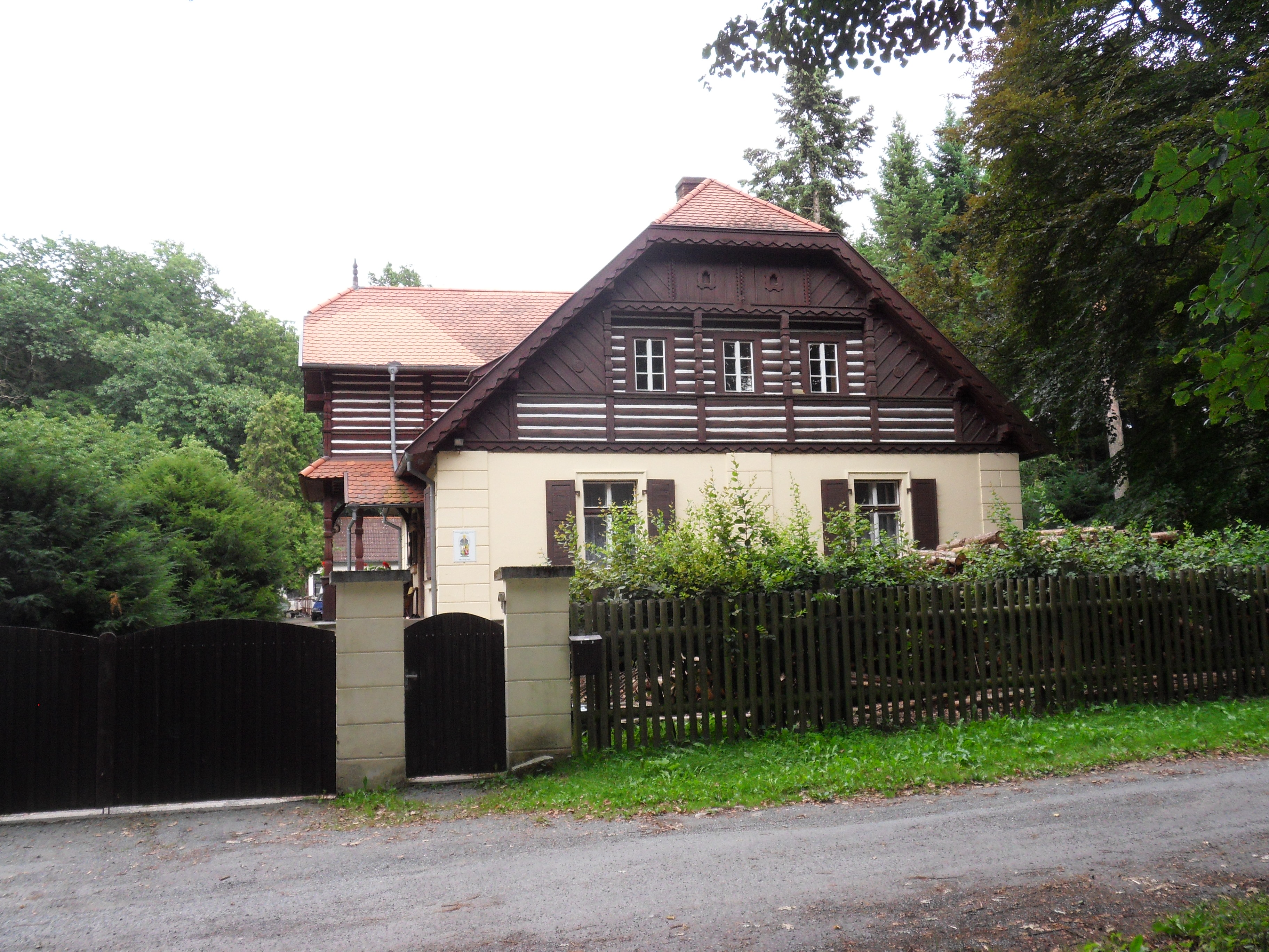 Myslivna Zábělá, Bukovec 77, okres Plzeň-město